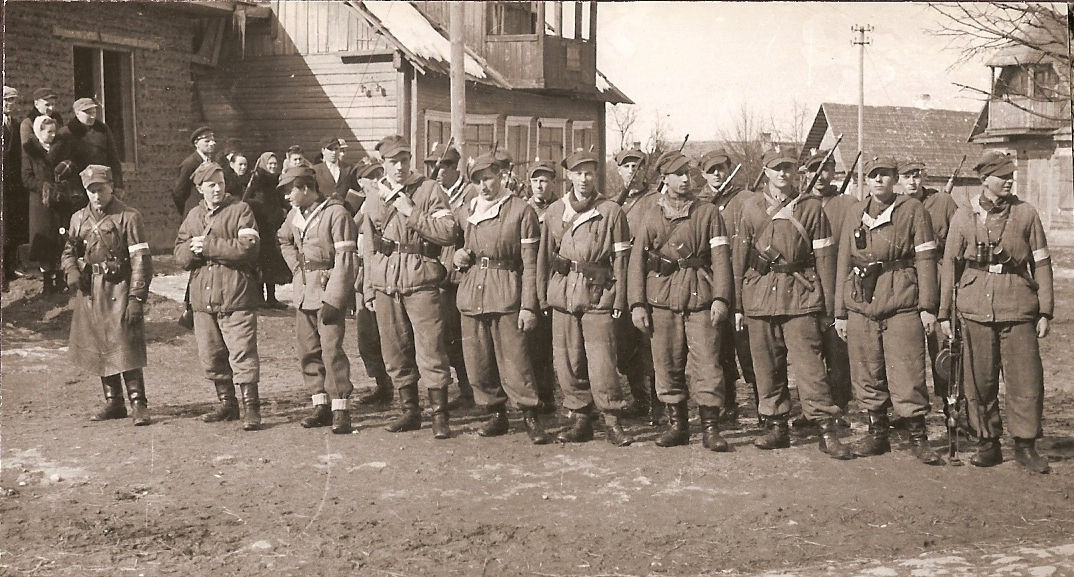 Pluton "Bosego" (część) 3 Wileńska Brygada AK